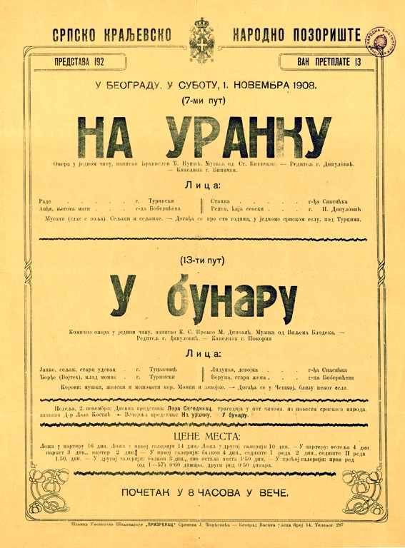 Srpski (latinica): Plakat 7. izvođenja opere "Na uranku"